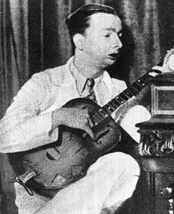 Brazilian composer Noel Rosa.